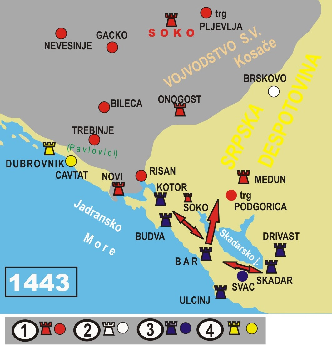 Млетачко заузимање градова у Приморју (Доња Зета) до маја 1443.године.Посједи: 1. С. В. Косаче ; 2. Српсог деспота; 3. Млечана и 4. Дубровачке републике.(Извор: Редакција за историју ЦГ –„Историја Црне Горе“, књига II-2, Титоград, 1970.)